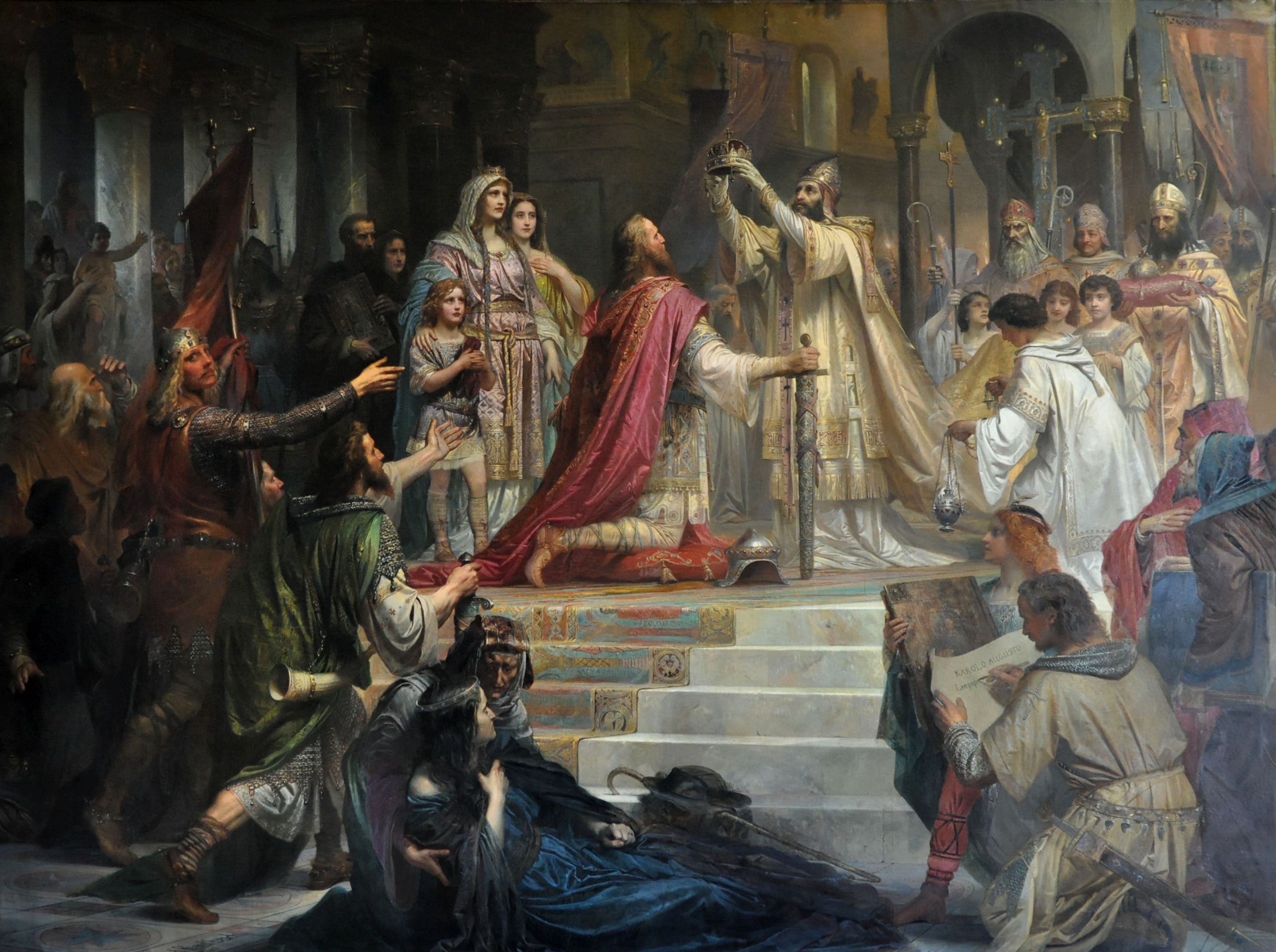 Die Kaiserkrönung Karls des Großen, Maximilianeum München